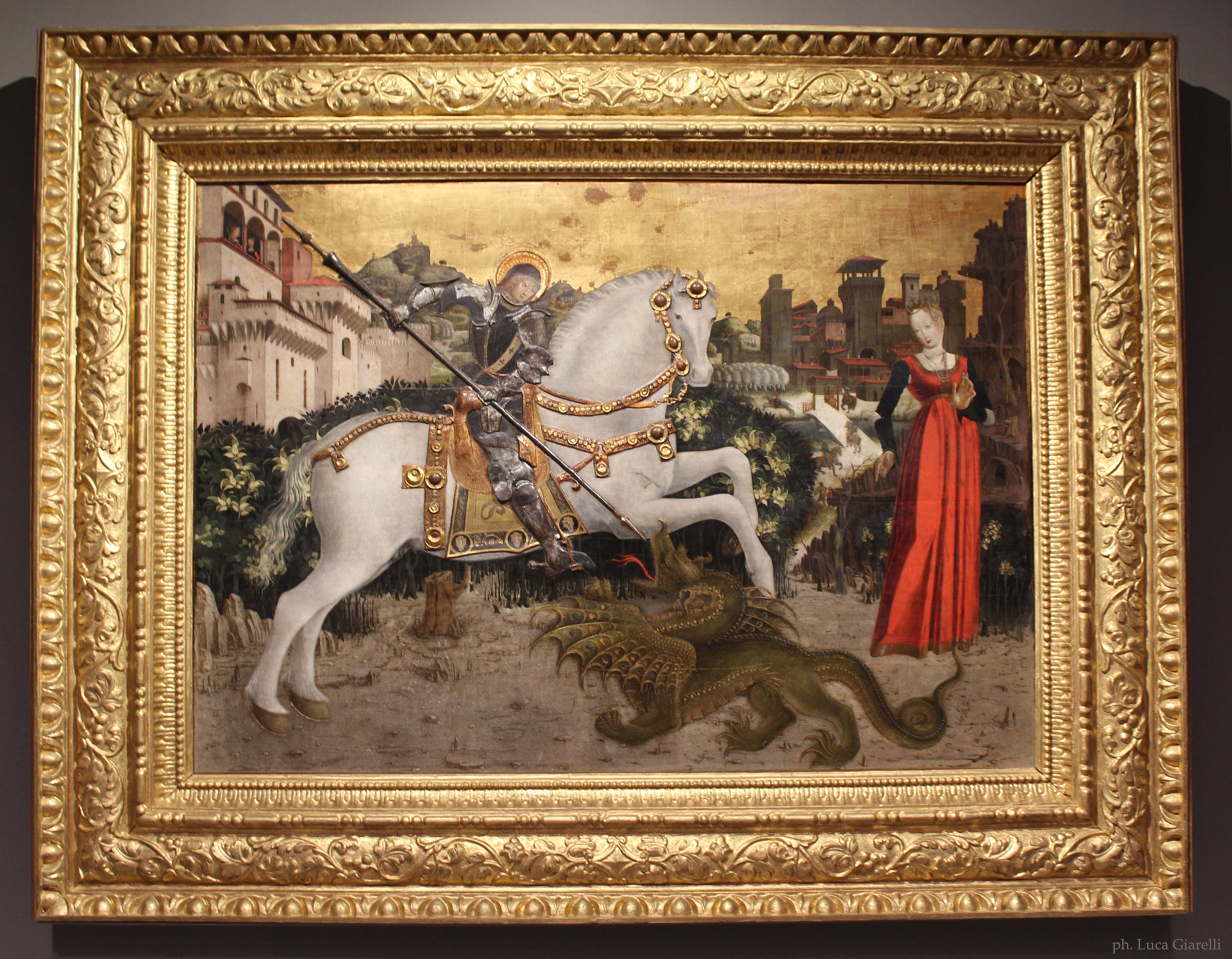 San Giorgio e il drago (pittore bresciano) - Pinacoteca Tosio Martinengo - Brescia